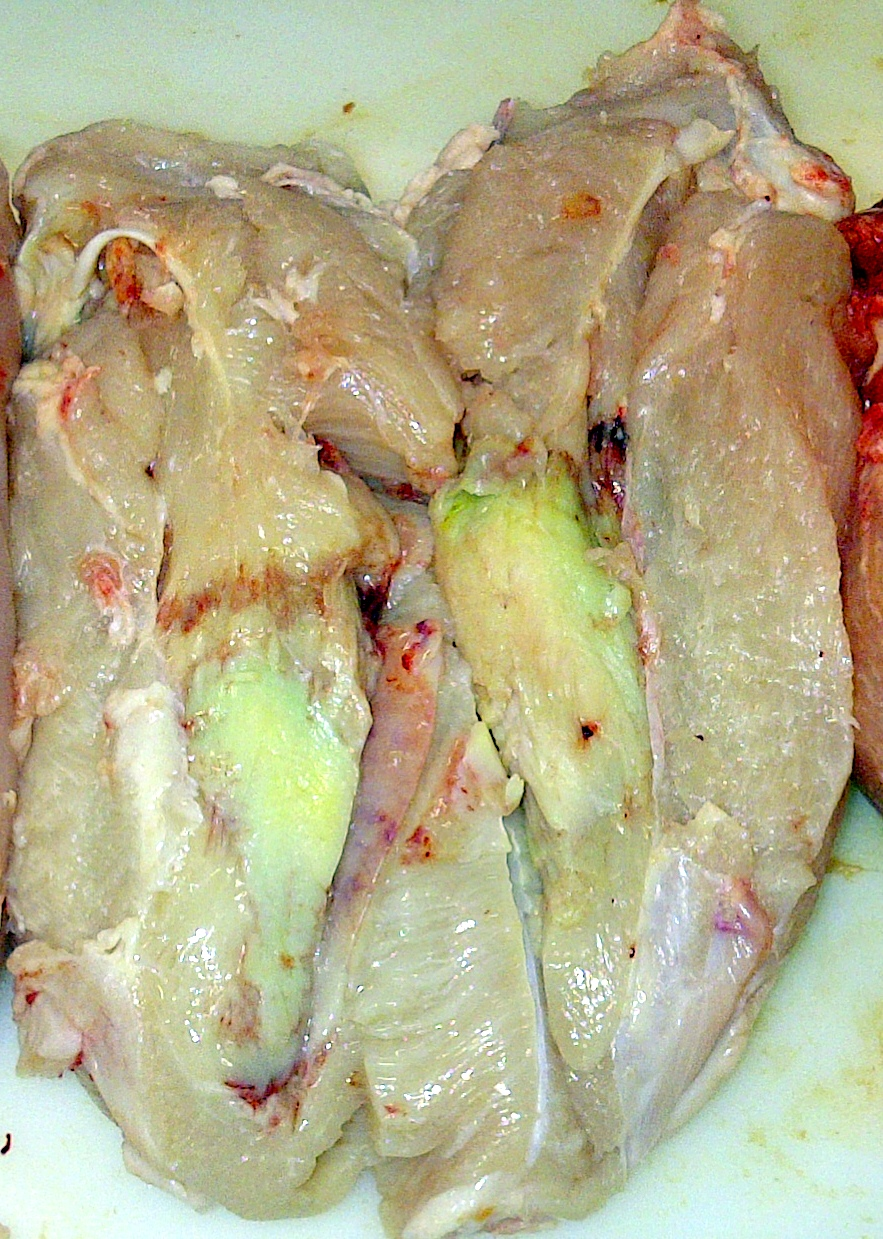 Malattia delloregon pollo